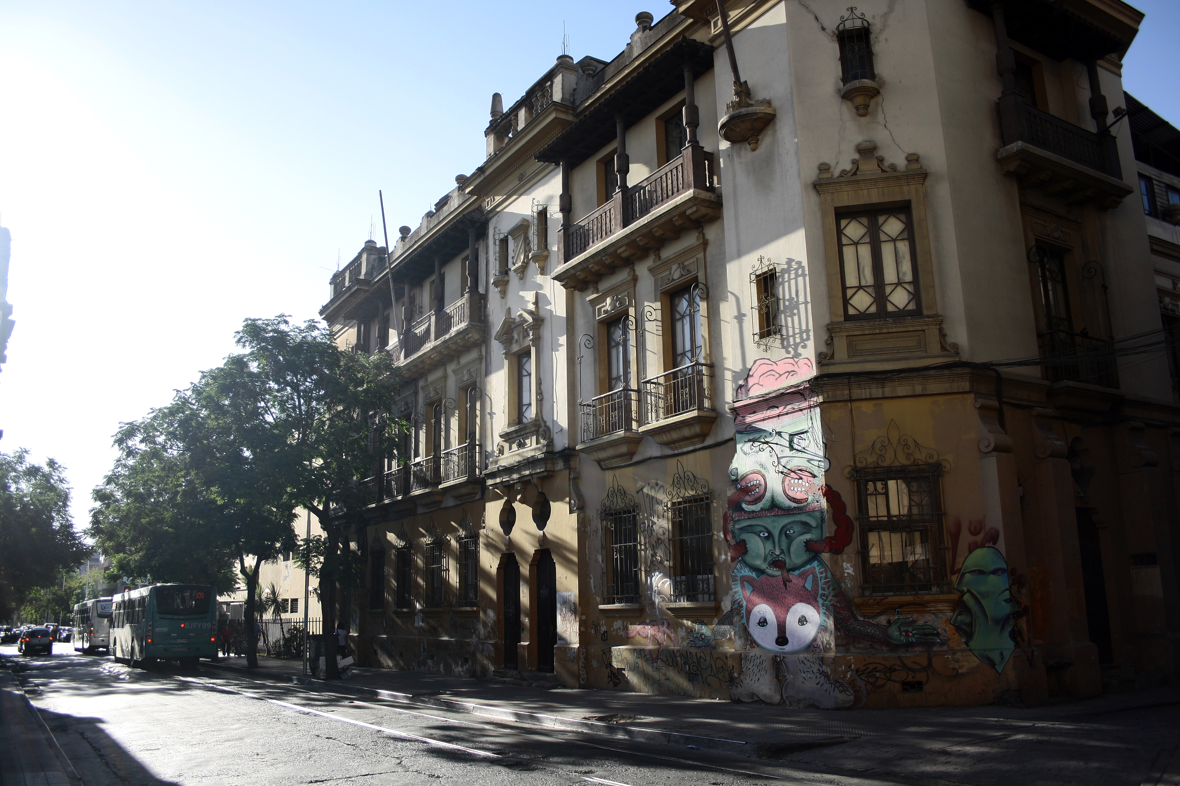 Edificio tipico en el barrio Brasil de Santiago, Chile.